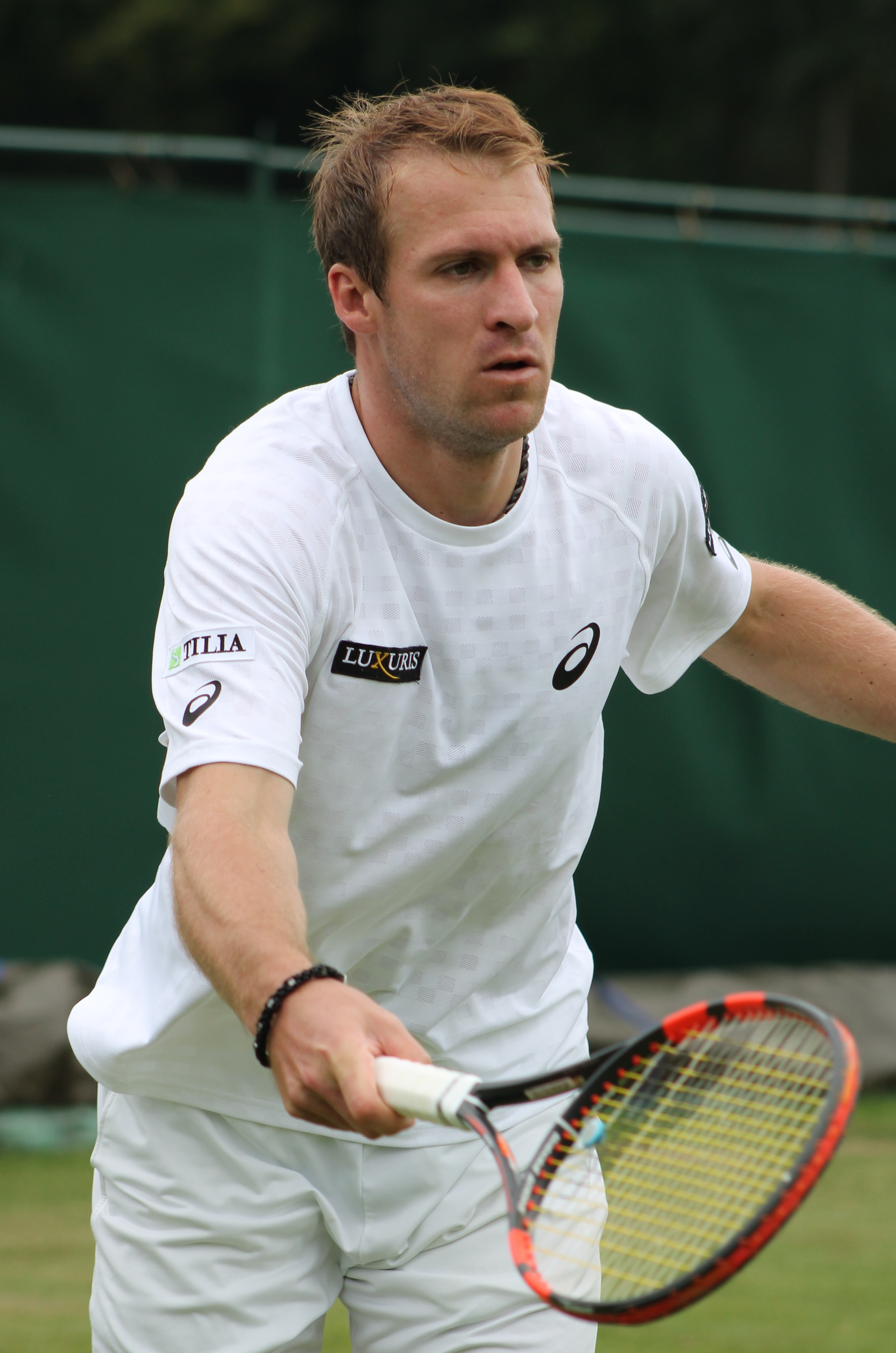 Zemlja WMQ14 (4)